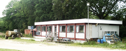 Børkop Motor Sport (BMS) klubhus